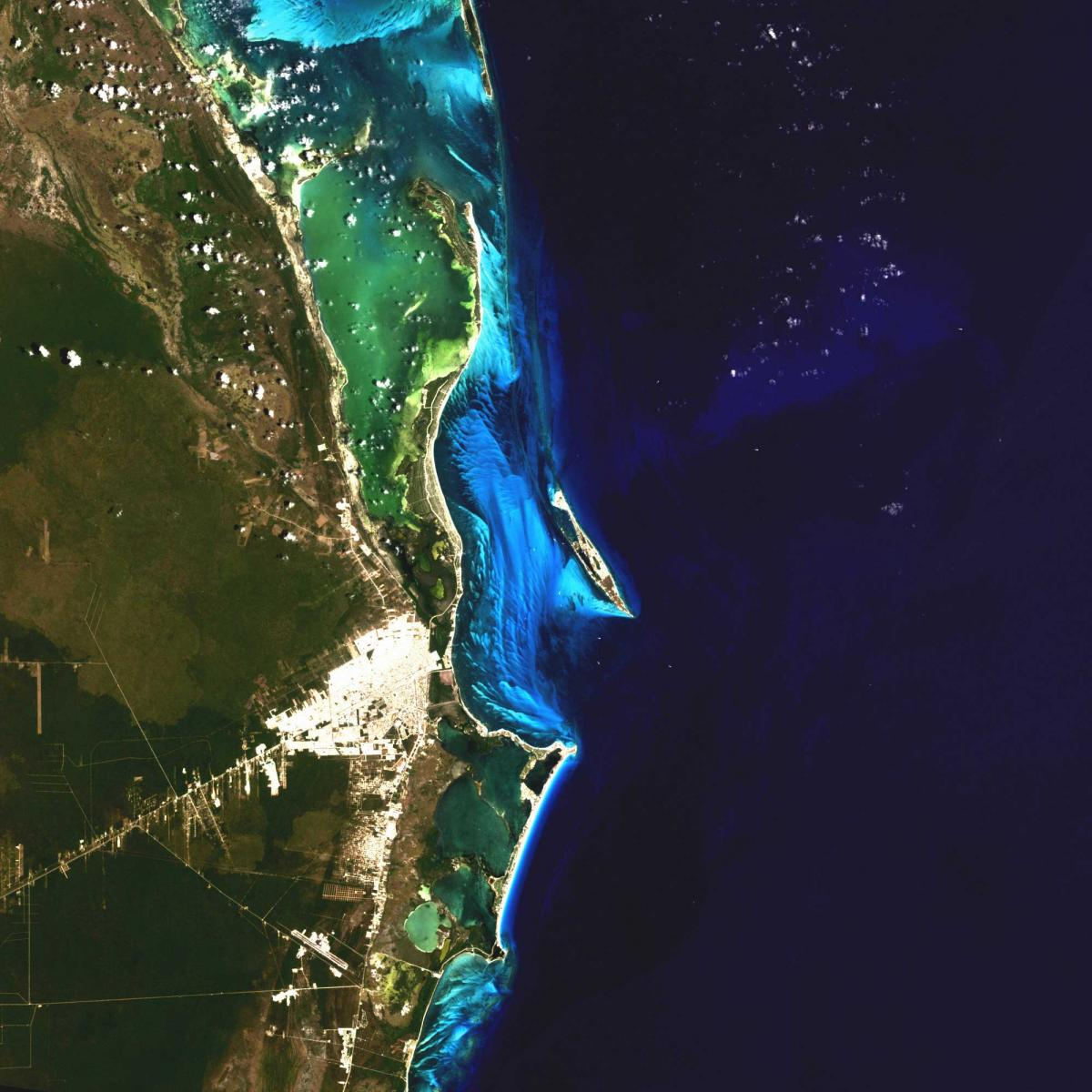 Imagen satelital de Cancún.